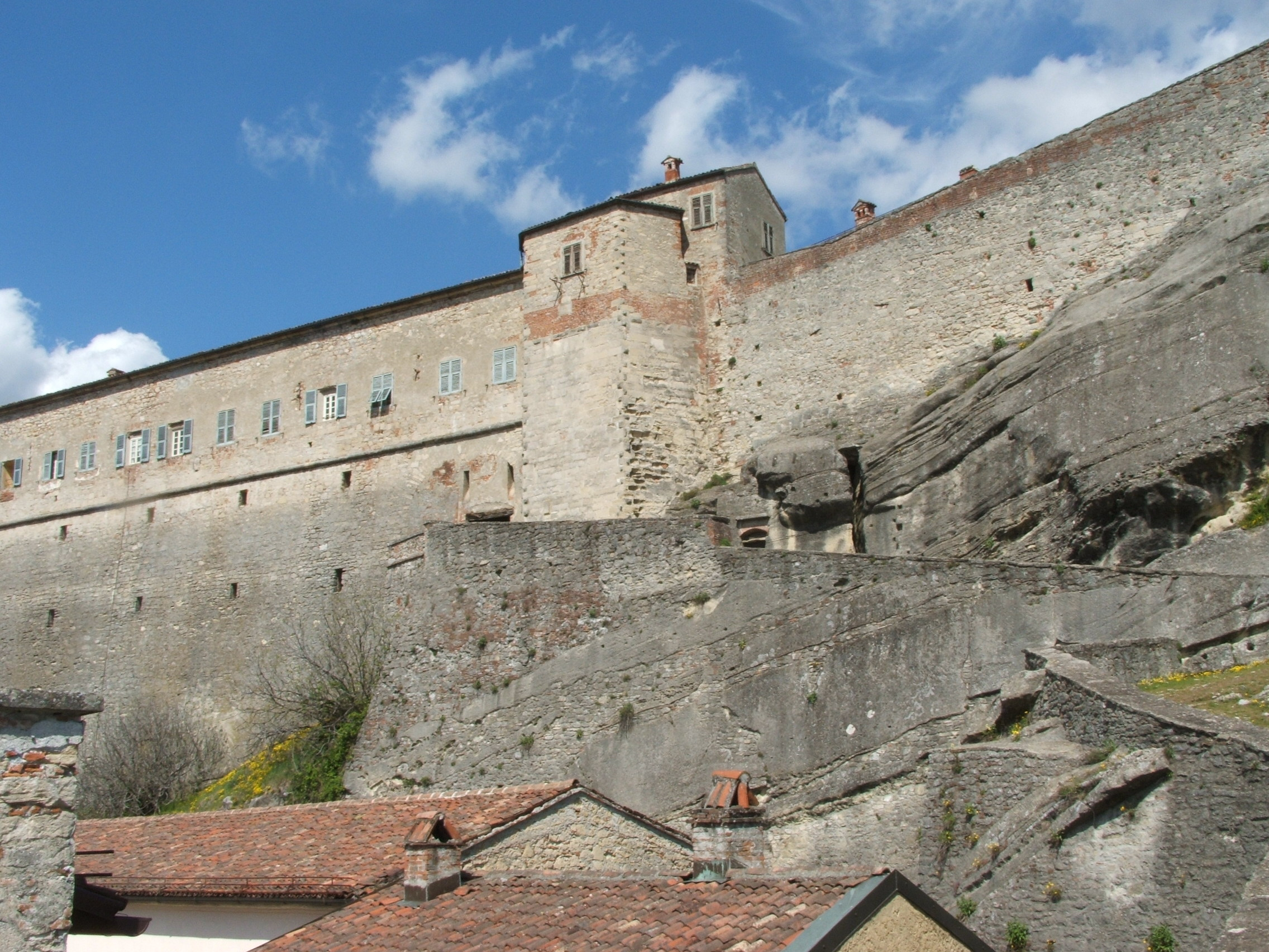 Forte di Gavi, Gavi, Piemonte, Italia - le mura della fortezza